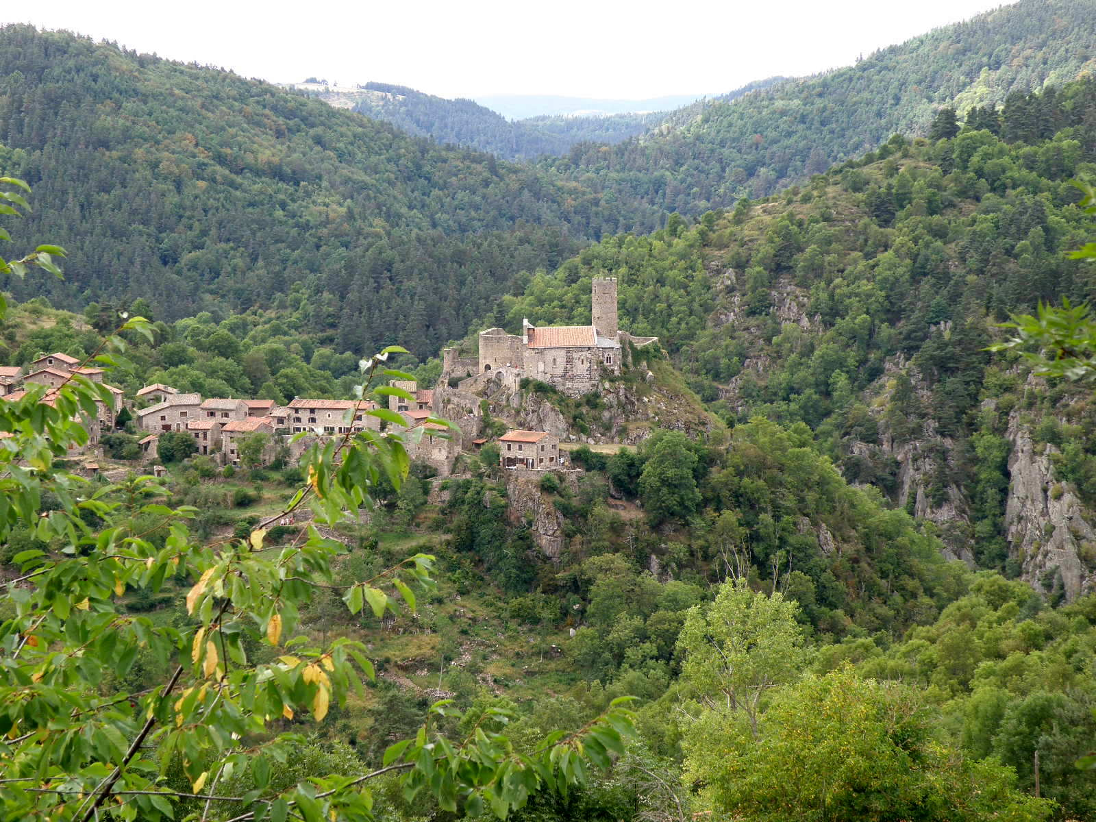 Hameau de Chalencon, appartenant à la comm. de Saint-André-de-Chalencon, dép. de la Haute-Loire, France (région Auvergne). Vue générale depuis la route départementale 24 (coup d'oeil vers l'ouest). Au centre, le château (avec donjon circulaire) sur son piton rocheux. À droite : vallée de l'Ance.